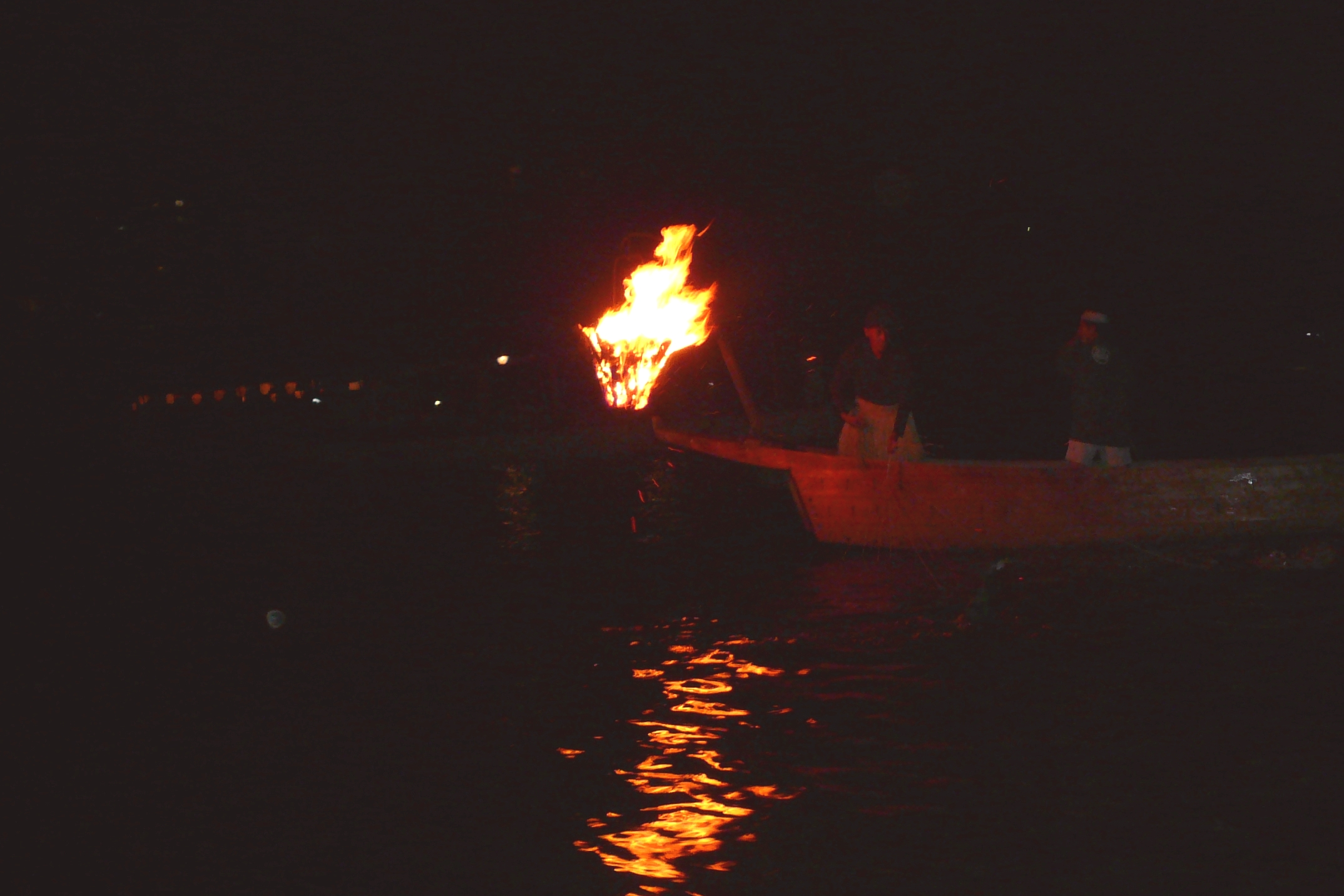 Ukai Nagaragawa（長良川鵜飼）,Gifu,Gifu(岐阜県岐阜市)で撮影。長良川のw:ja:鵜飼。